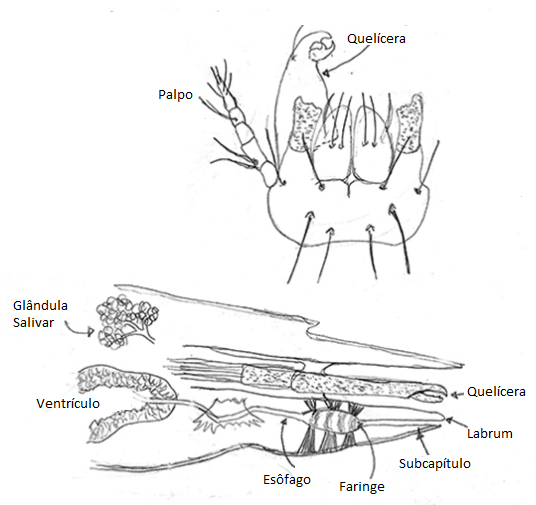 detalhes do gnatossoma